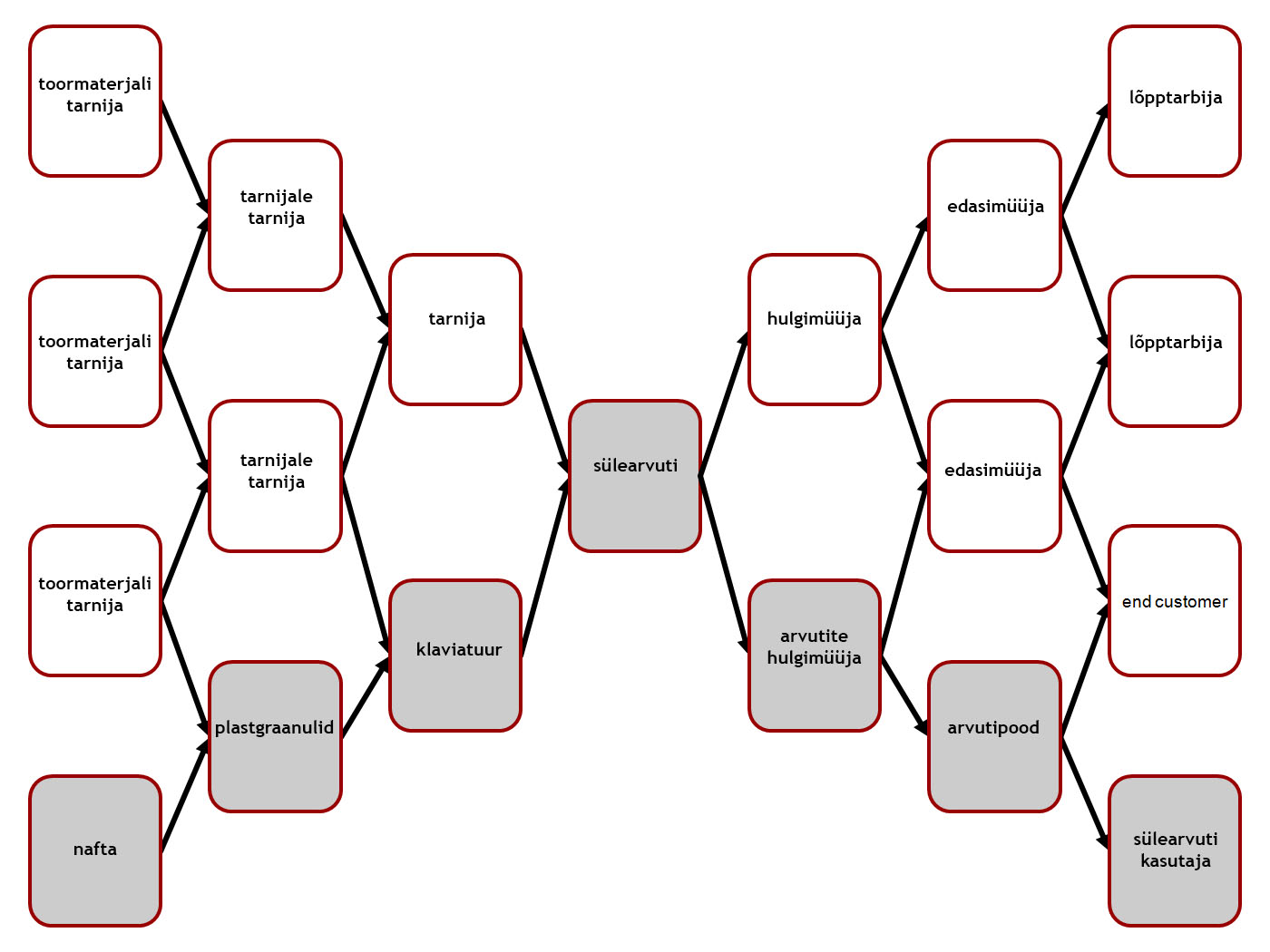 Lihtsustatud näide tarneahelast. Tõlge raamatust Wieland, Andreas (2011). Supply-Chain-Management in stürmischen Zeiten.